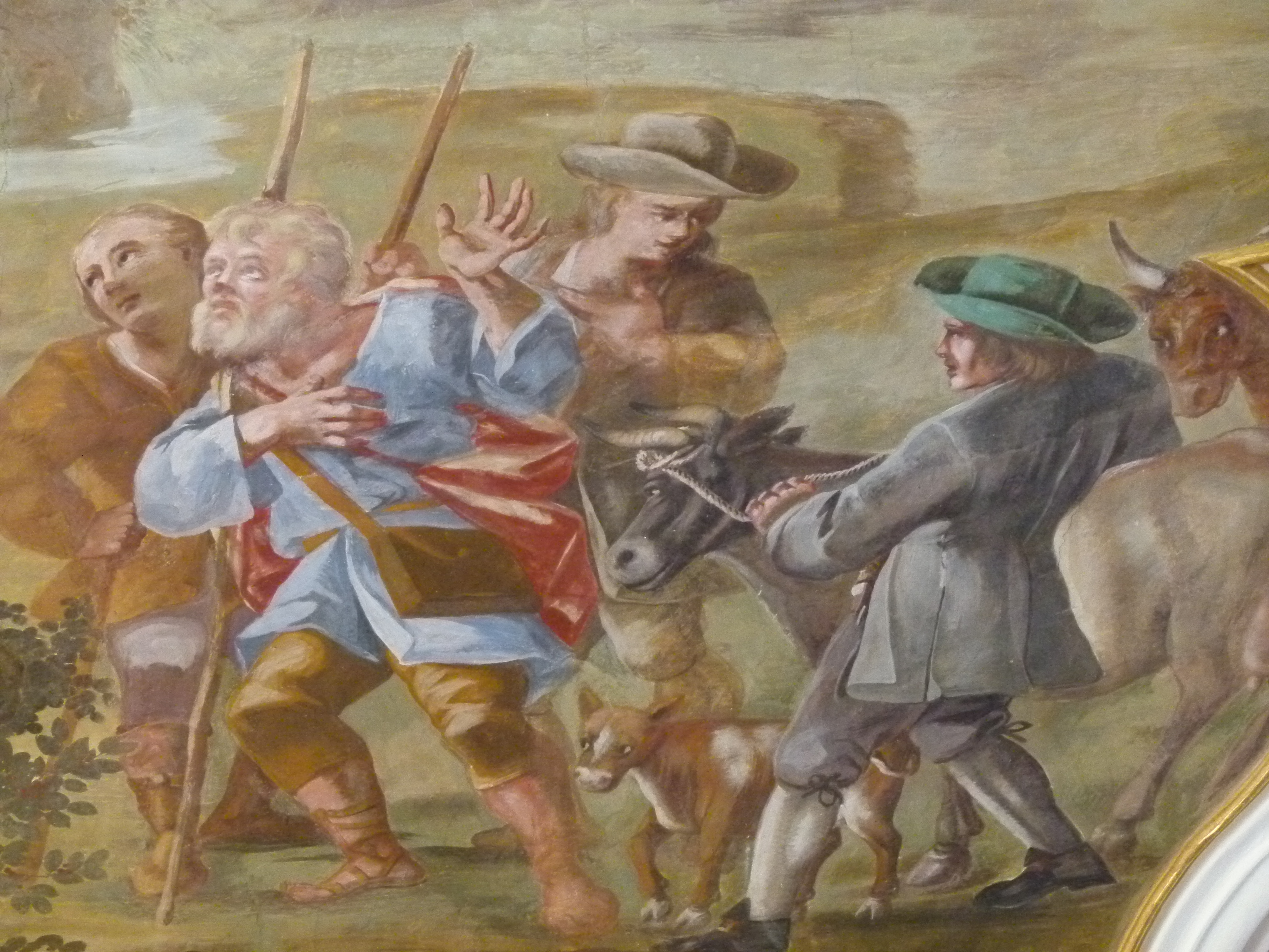 Fresko an der Decke des Langhauses der Filialkirche St. Leonhard in Pfronten-Heitlern (Detail)